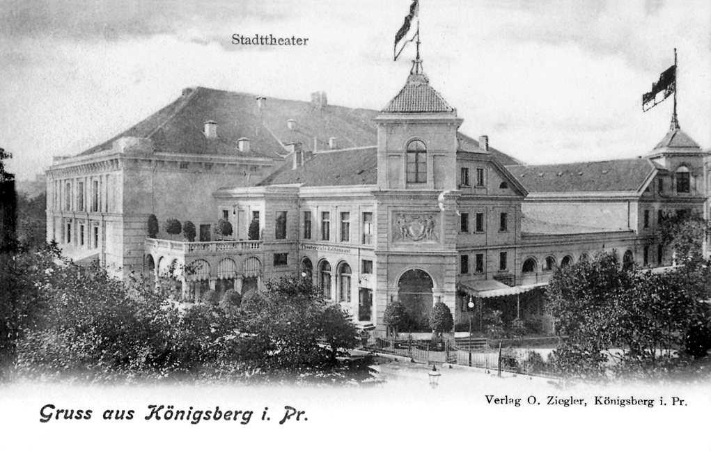 Königsberg